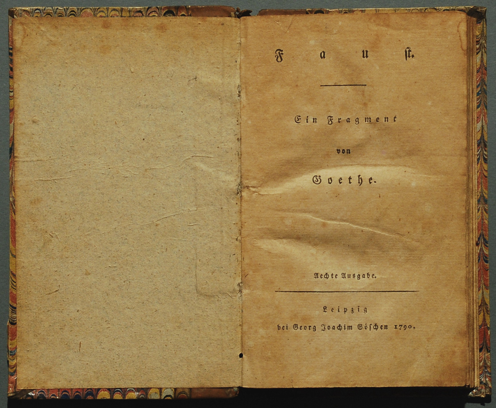 Goethe, Johann Wolfgang: Faust. Ein Fragment. Aechte Ausgabe. Leipzig: G. J. Göschen 1790, 168 Seiten. Hagen 204 D mit einem Titelblatt um 1820 (Hagen 204i). Erster rechtmäßiger Einzeldruck als Titelauflage.